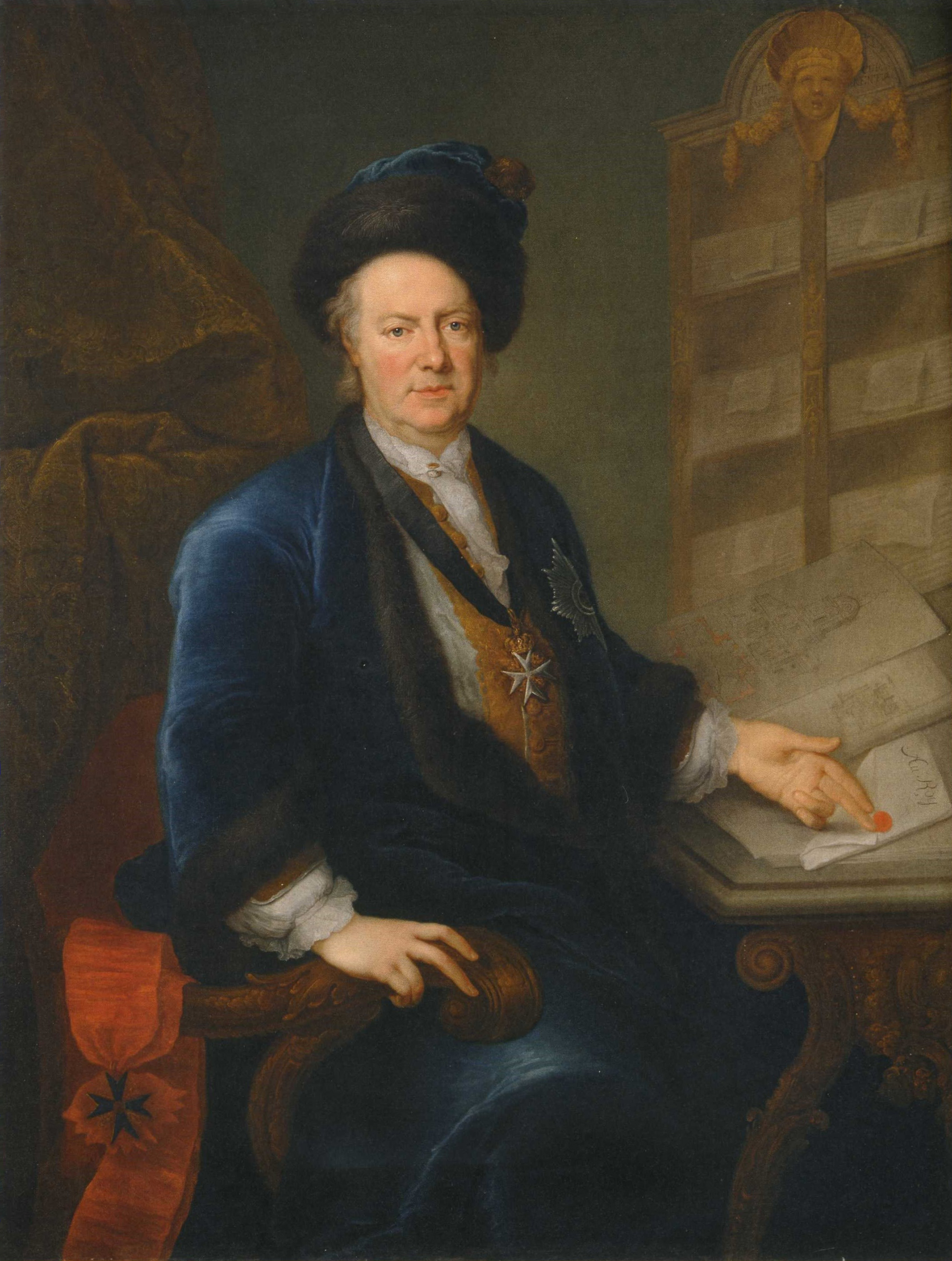 Adam Otto von Viereck, Wirklicher Geheimer Etat-, Kriegs- und dirigierender Minister beim Generaldirektorium. Öl auf Leinwand. Stiftung Preußische Schlösser und Gärten, GK I 11987